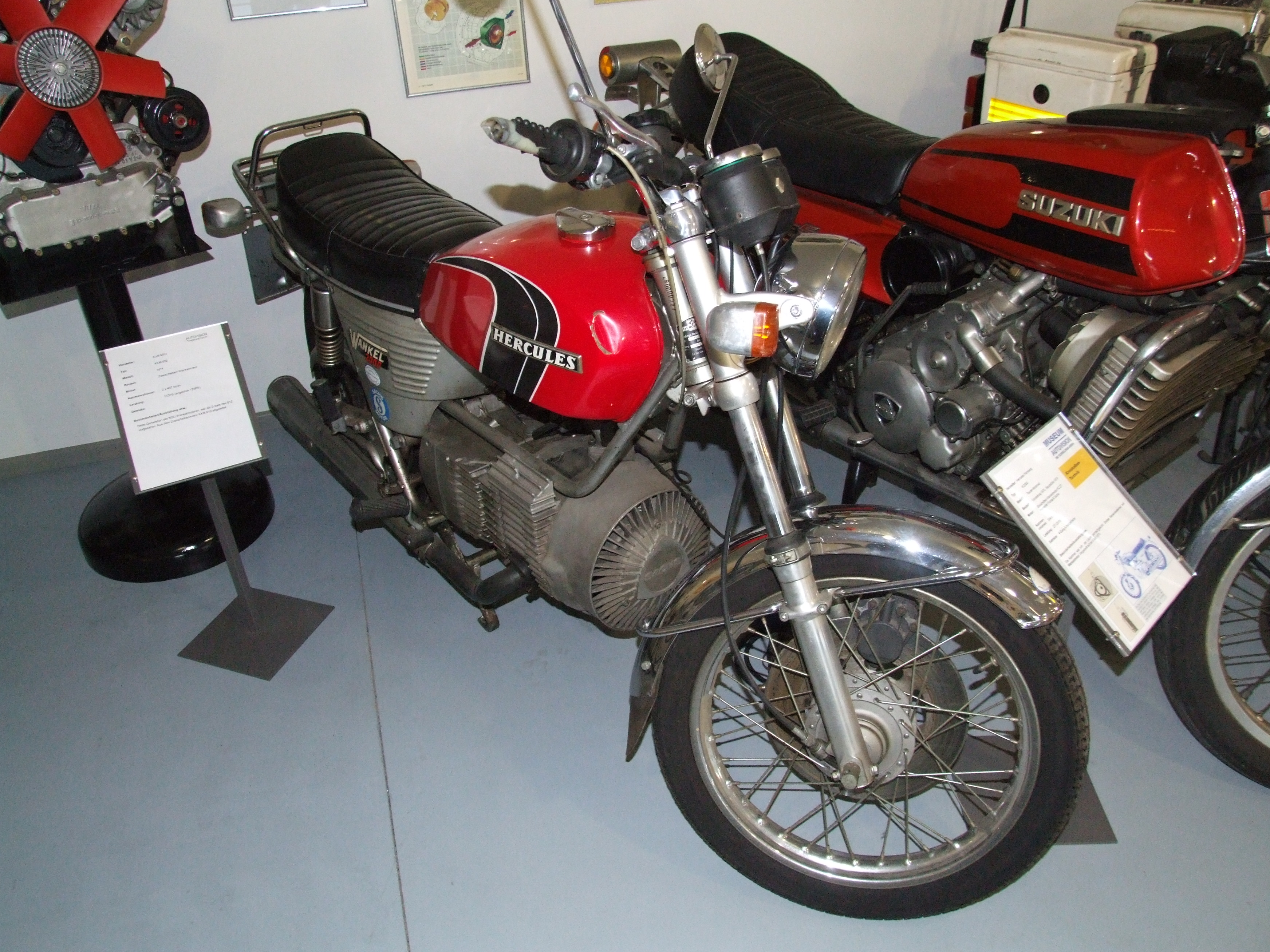 Hercules Wankel 2000, Museum Autovision, Altlußheim